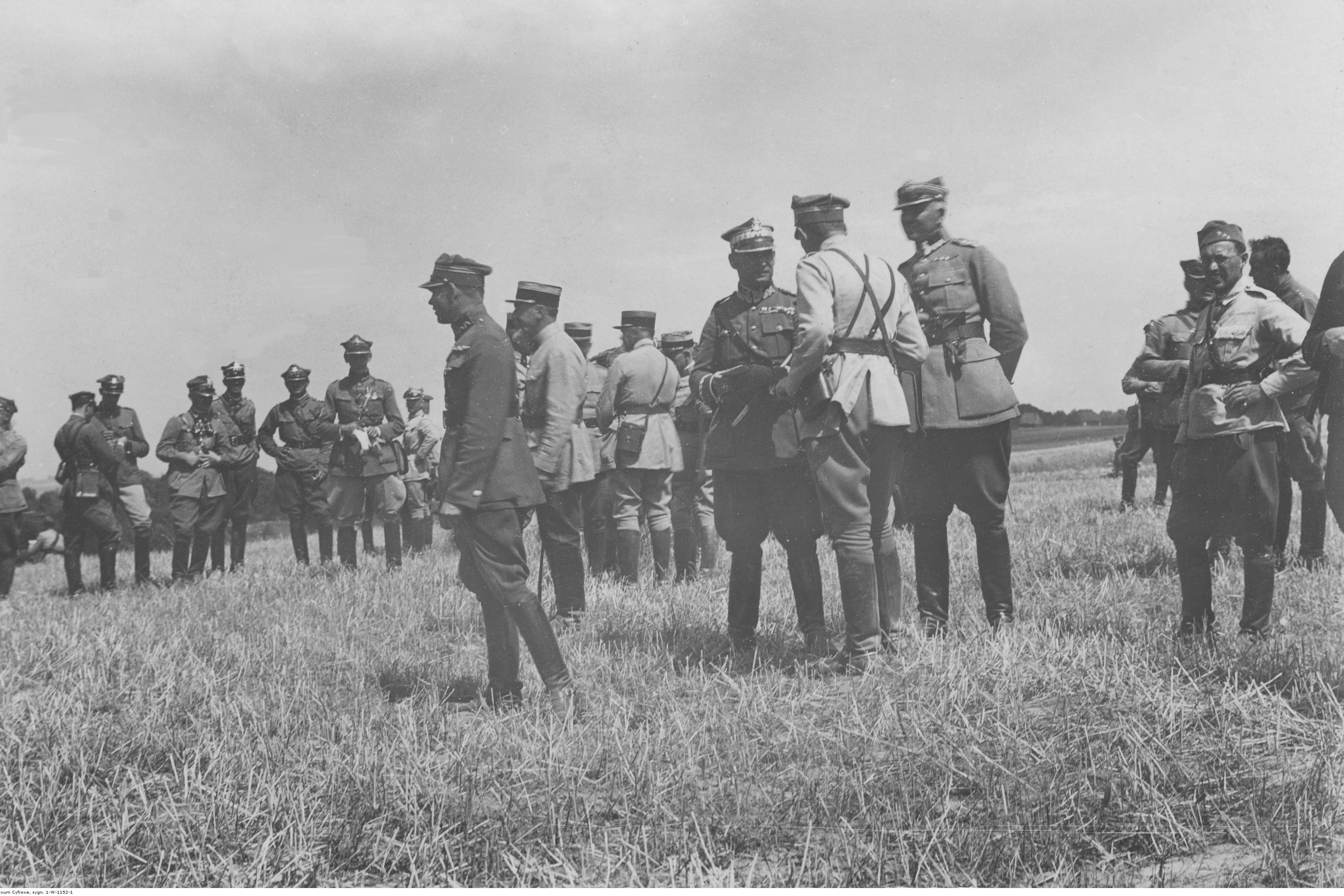 Ćwiczenia 23 Górnośląskiej Dywizji Piechoty dla Wyższej Szkoły Wojennej. Uczestnicy ćwiczeń. Widoczny m.in. gen. Józef Zając (z przodu, w środku, w czapce generalskiej). Koncern Ilustrowany Kurier Codzienny - Archiwum Ilustracji. Sygnatura: 1-W-1152-1